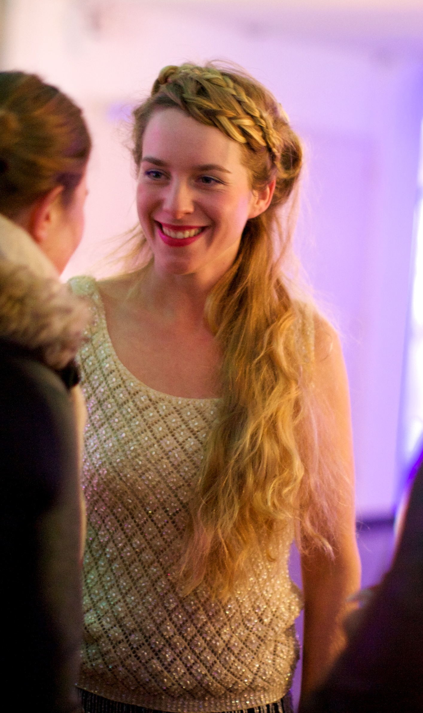 Opening van de expositie The Dwarf Empire, de eerste solo expositie van fotografe Sanne De Wilde, in Vlaams cultuurhuis De Brakke Grond.